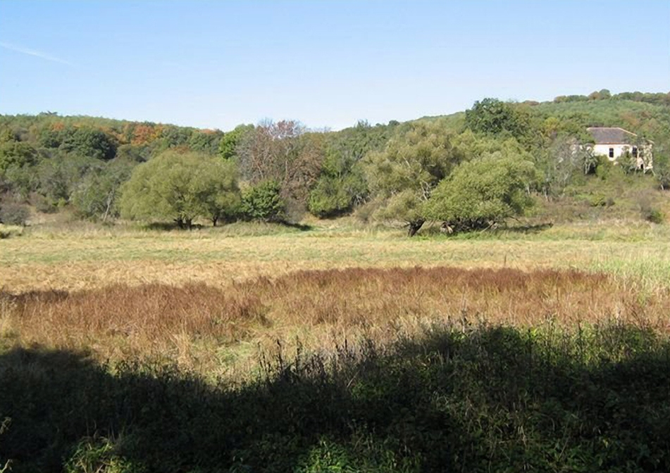 A volt falu közepén.